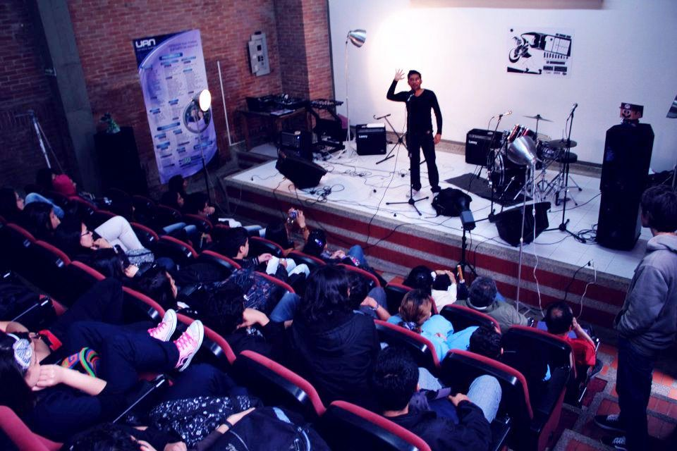 Teather